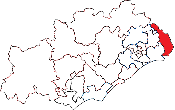 Situation du canton dans le département de l'Hérault